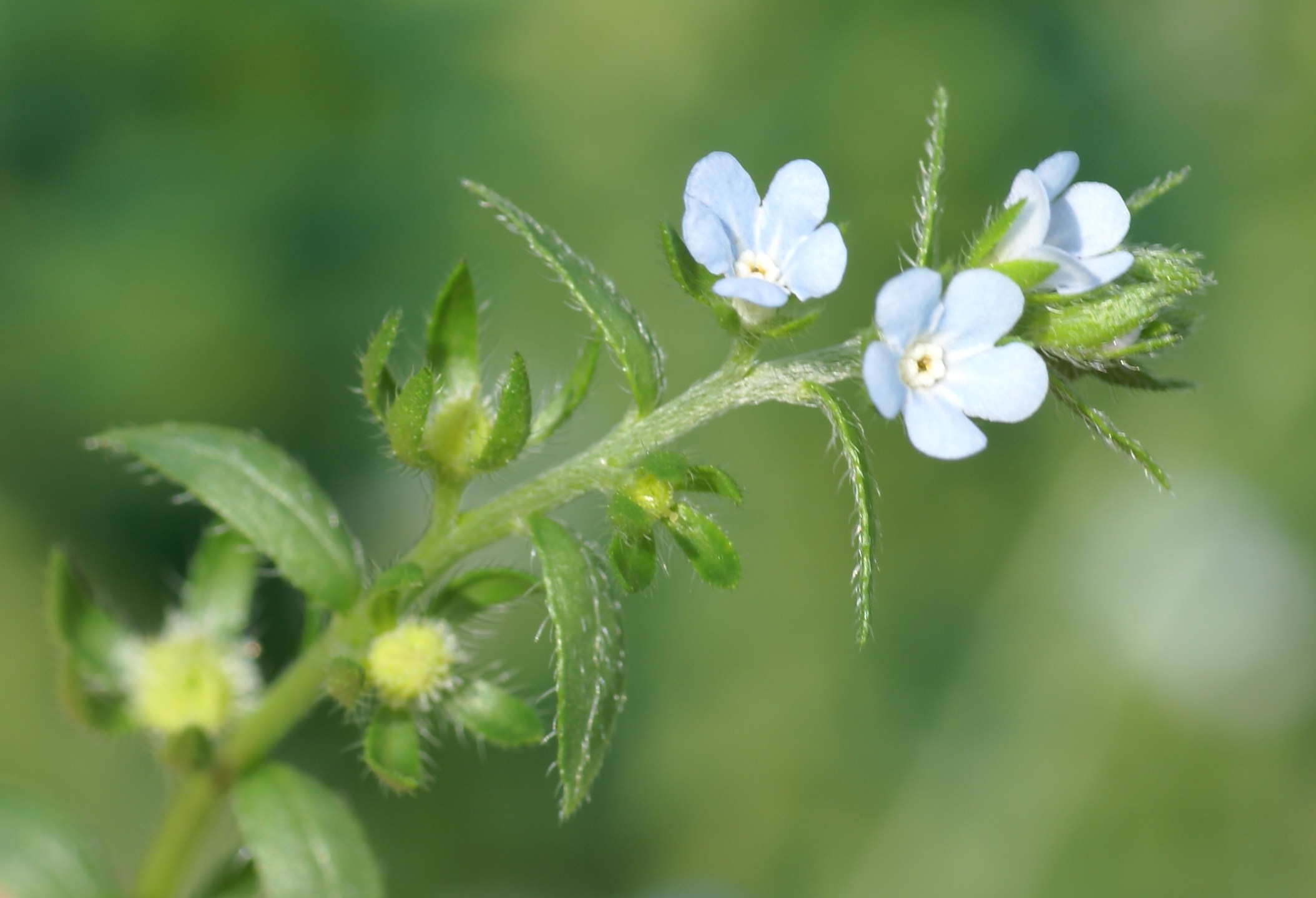 Plant species Lappula squarrosa shot in Bergianska trädgården in northern Stockholm